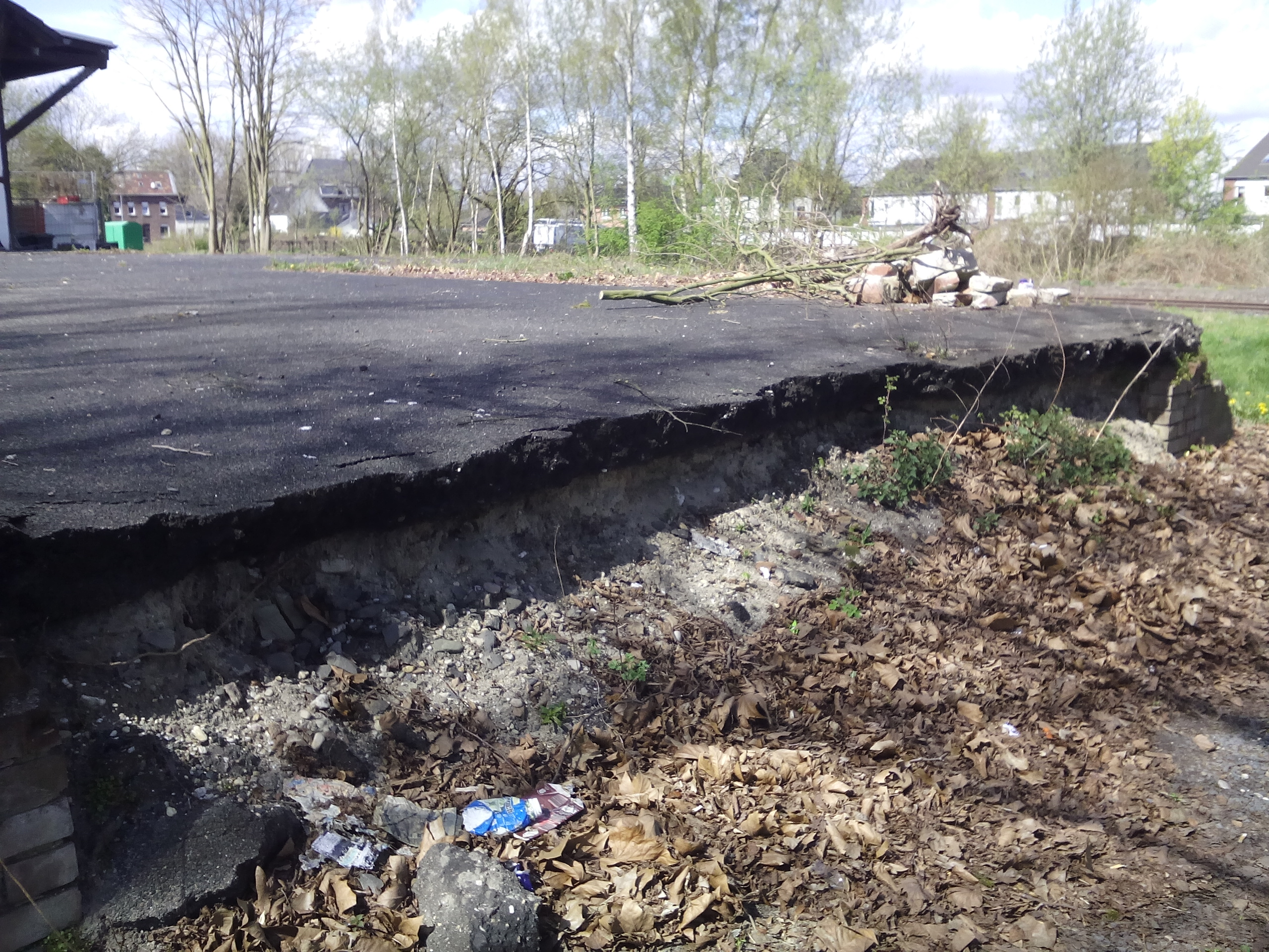 Das ehemalige, jetzt betonierte, Gleisbett im Bahnhof Wegberg